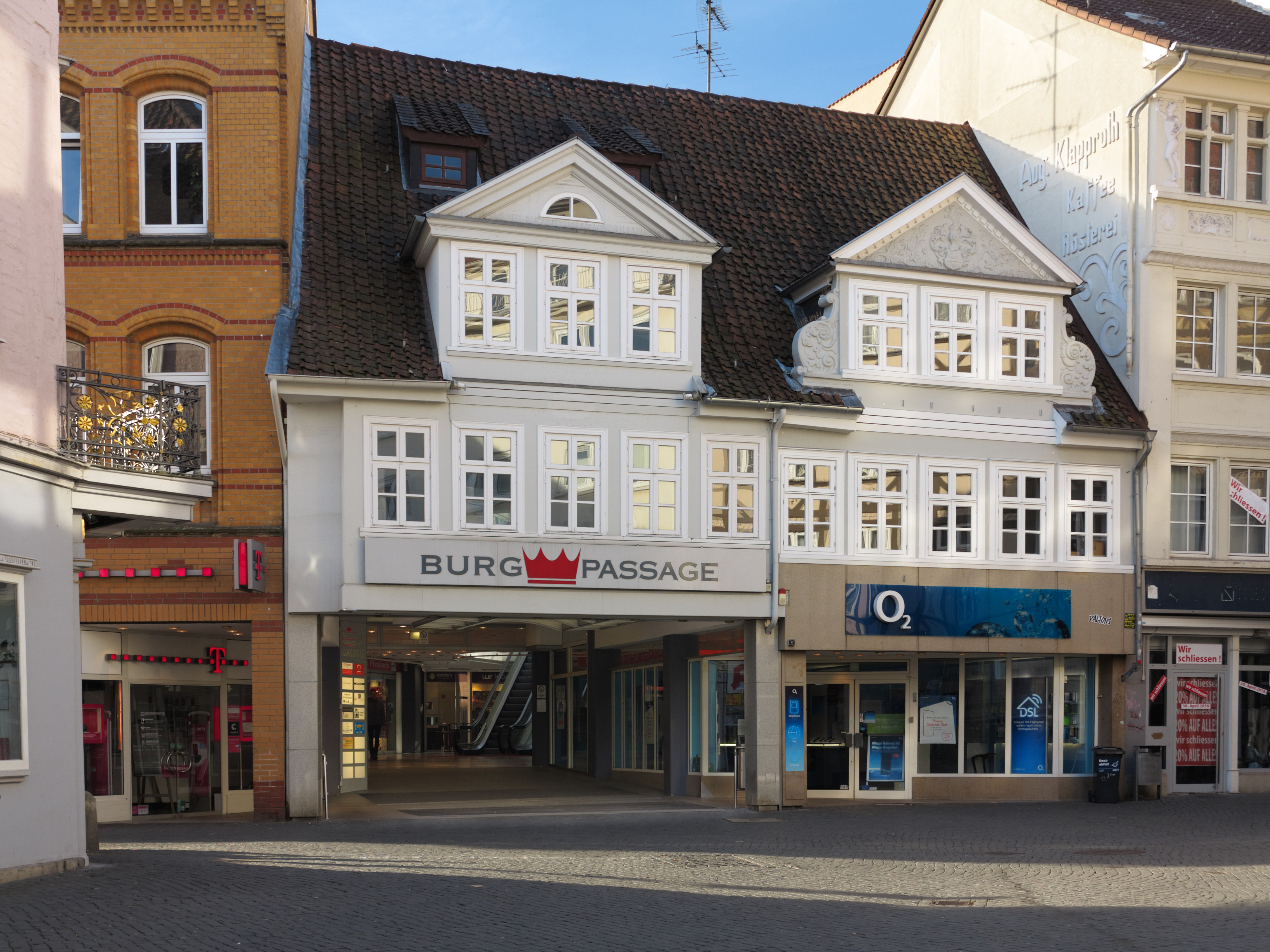 Der Nord-Eingang der Braunschweiger Burgpassage